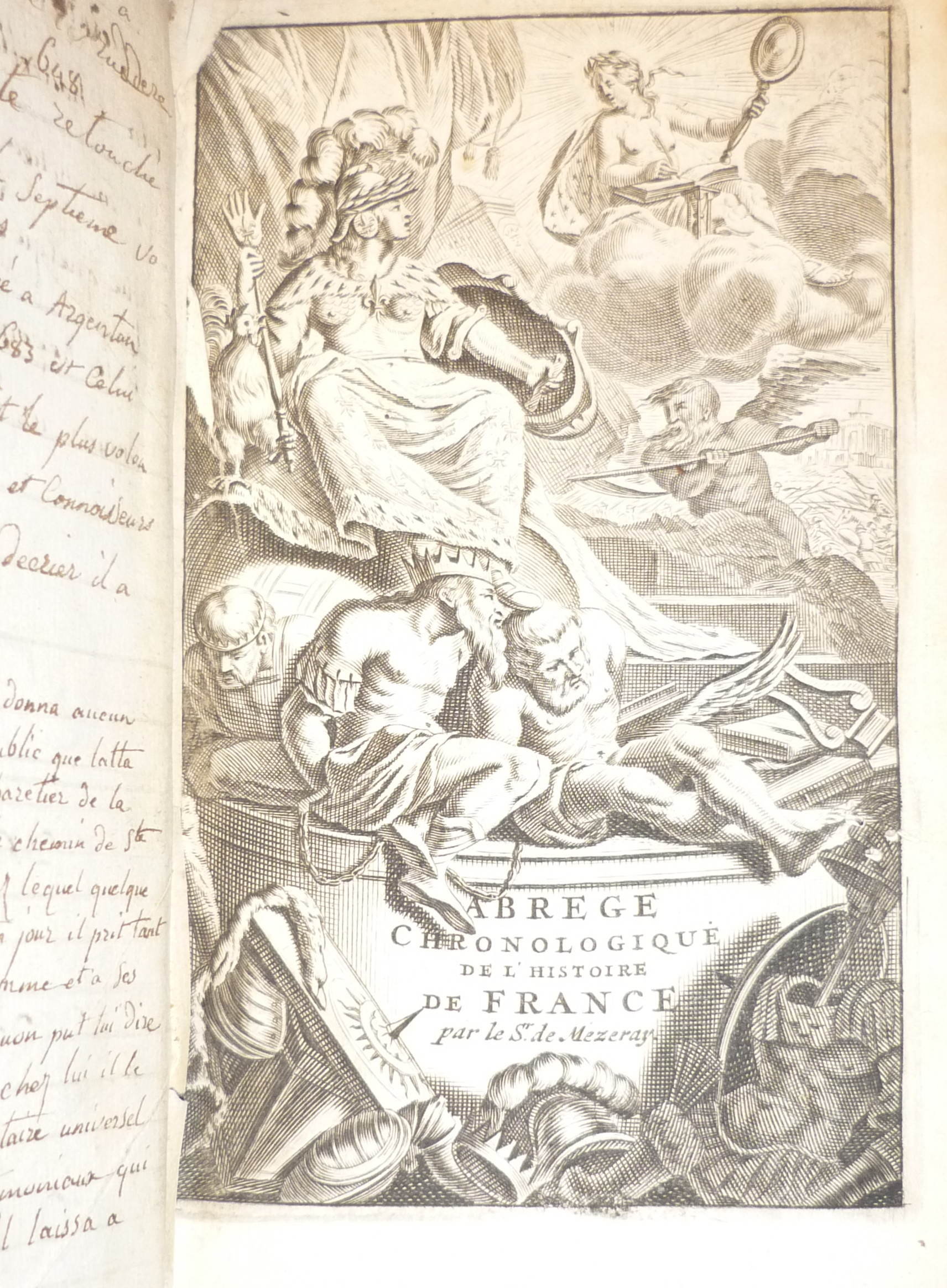 Frontispice du livre de Mézeray, imprimé à Amsterdam chez Henri Schelte en 1701: Abrégé de l'histoire de France.